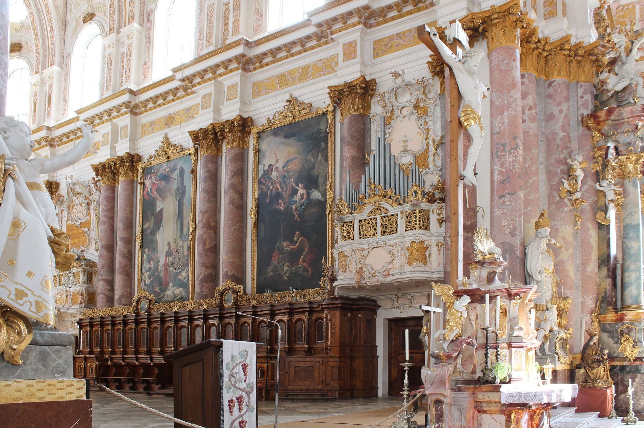 Chorgestühl im Kloster Fürstenfeld mit eingebauter Orgel von J. Zeilhuber von 1948, II/23